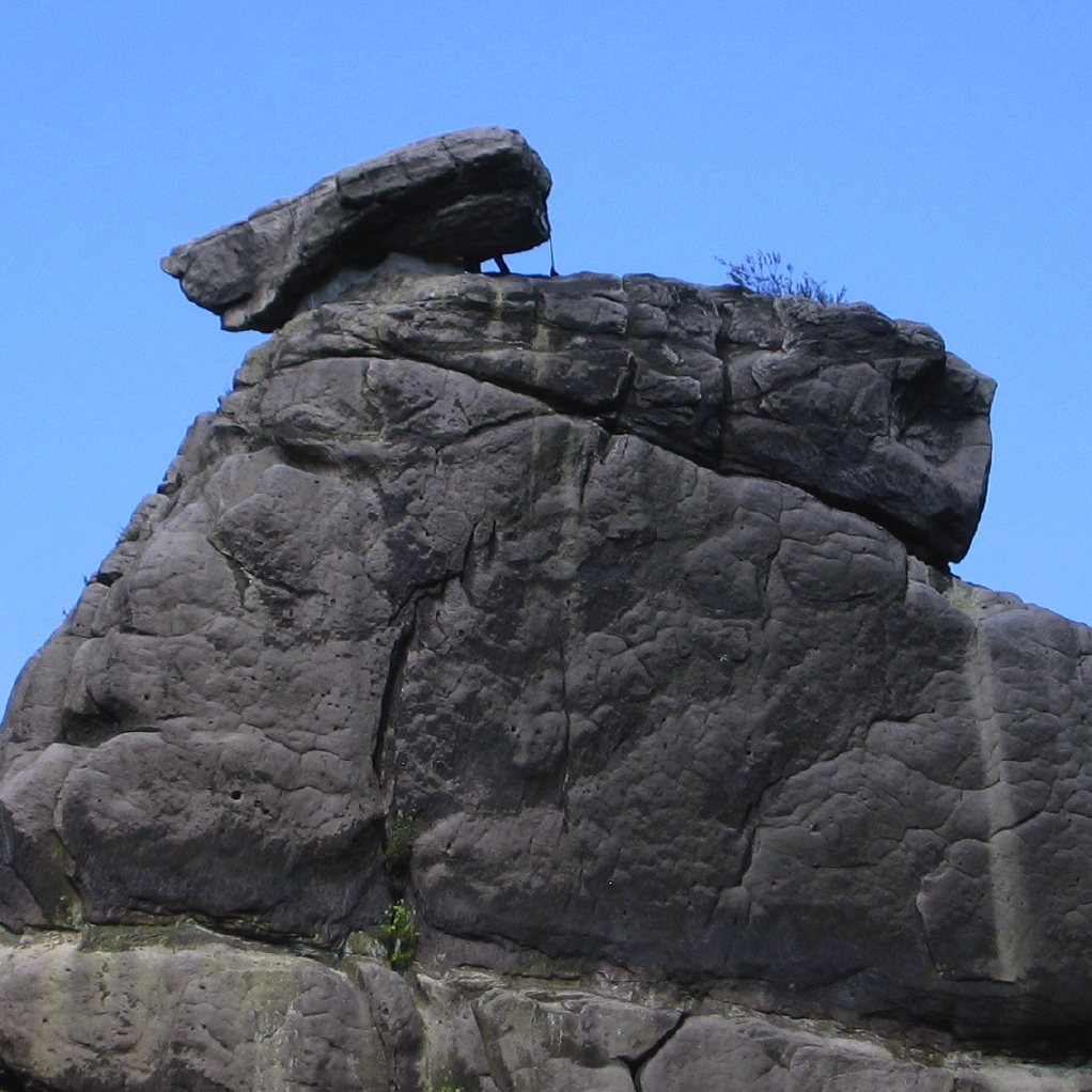 Der „Wackelstein“ auf dem Wackelsteinfels der Externsteine, Ansicht von Südwesten